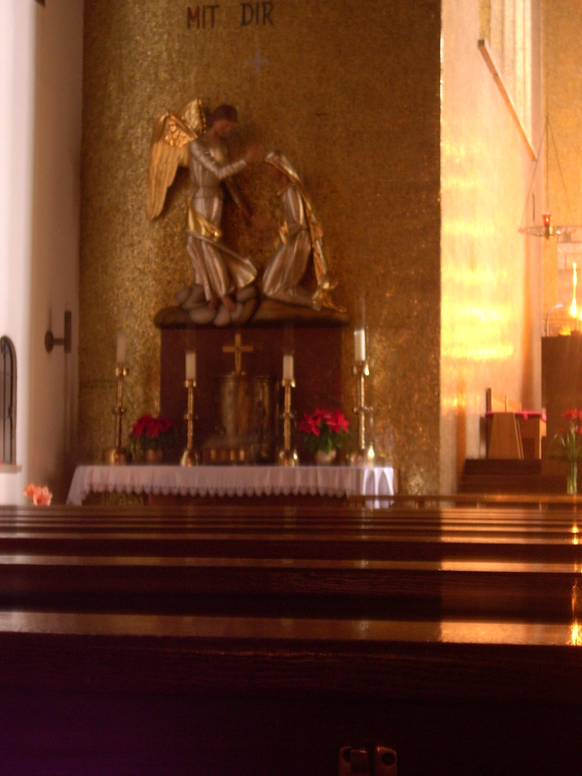 Blick zum Marienaltar der Herz-Jesu-Kirche (Weiden in der Oberpfalz), Deutschland.